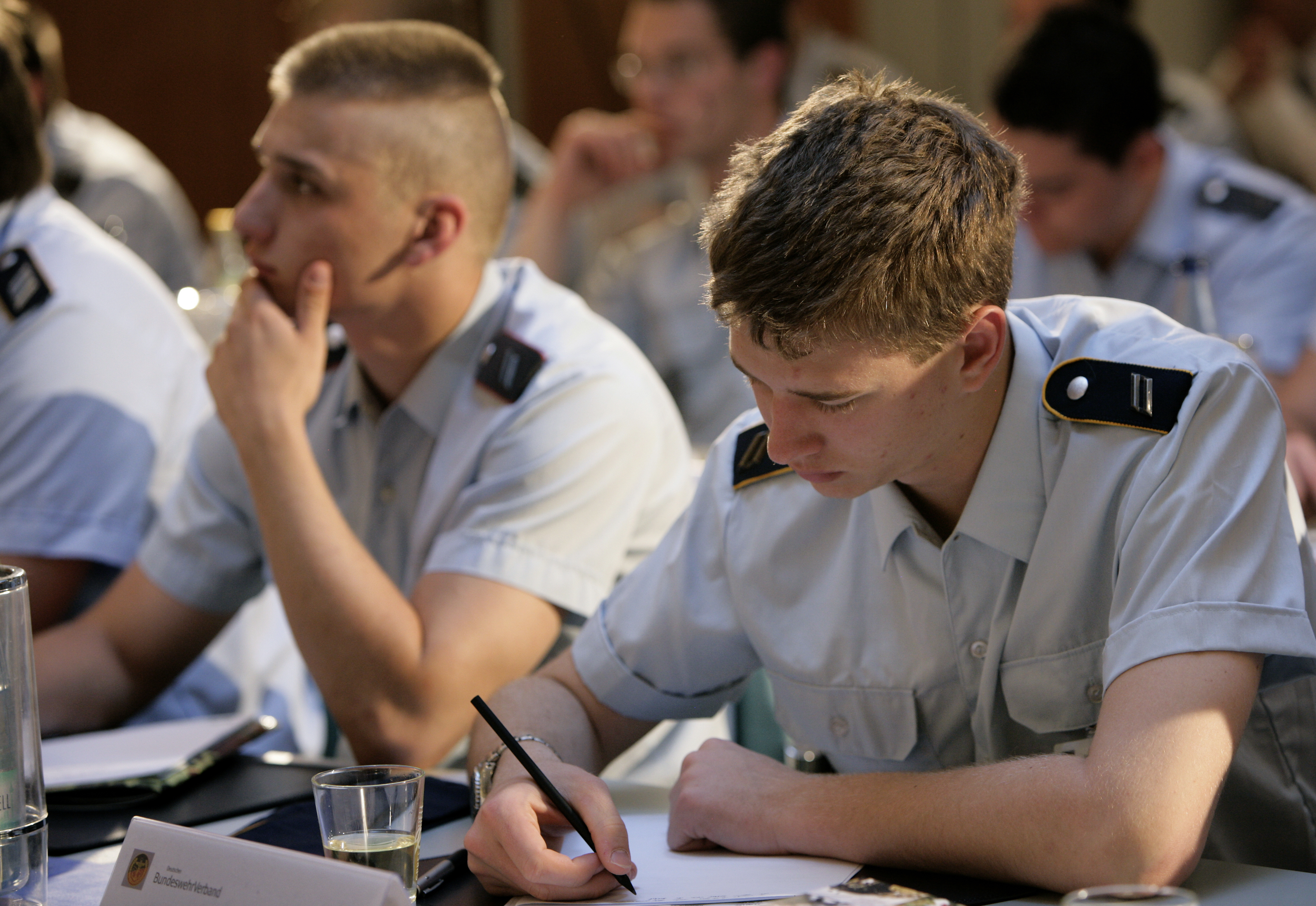 Berlin, 30.06.2010..Beim „Parlament der Wehrpflichtigen“ des Deutschen Bundeswehrverbandes diskutierte Verteidigungsminister Dr. Karl-Theodor Freiherr zu Guttenberg am 29. Juni mit jungen Soldaten über die Wehrpflicht. Dabei machte der Minister deutlich, dass angesichts der bestehenden Strukturen und der strengen Sparvorgaben ein „Weiter so“ für die Bundeswehr nicht in Frage komme. ©Bundeswehr/Bienert